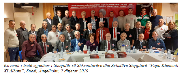 Kuvendi i Tretë Zgjedhor i Shoqatës, Ängelholm 7-dhjetor-2019